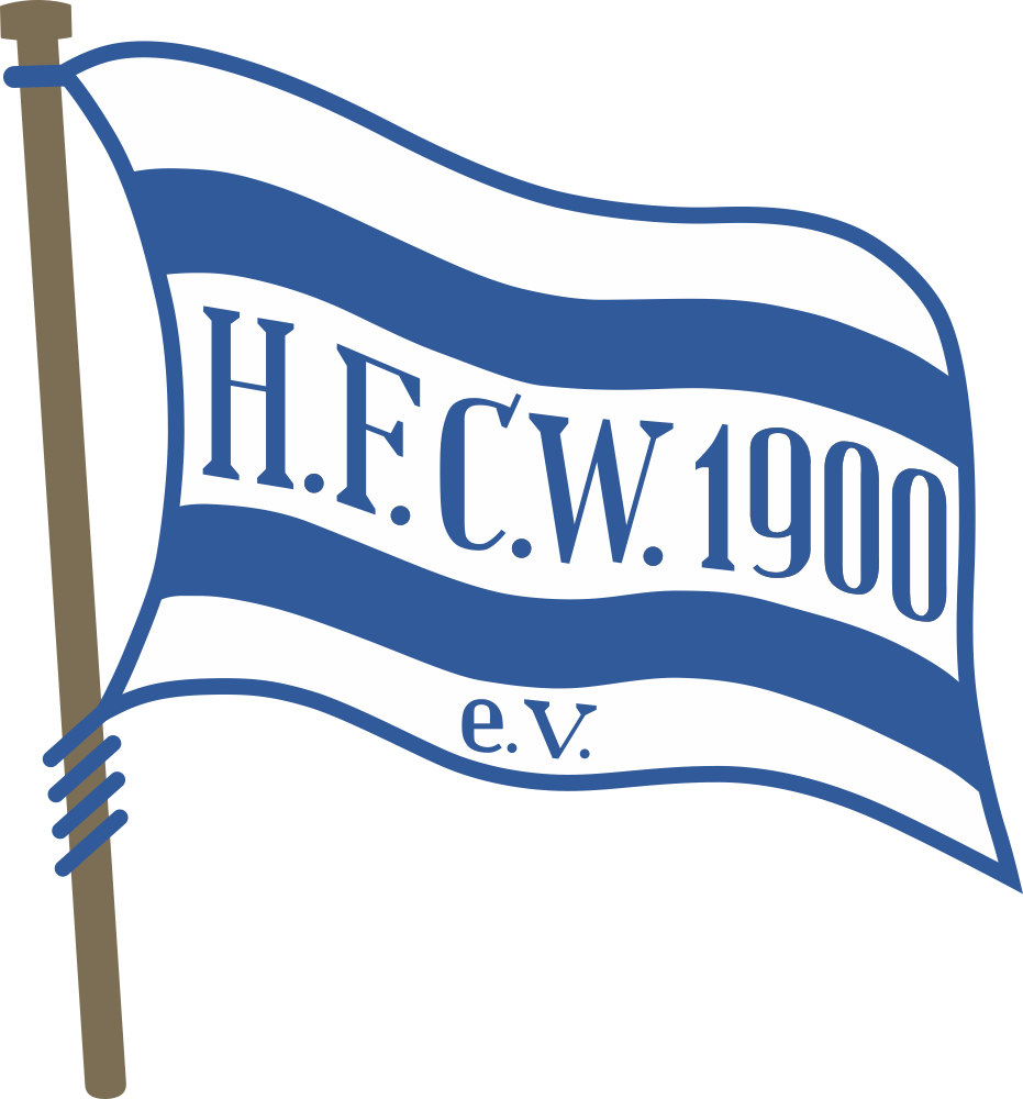 Logo des Halleschen Fußballclubs Wacker 1900 e.v. (FC Wacker Halle)